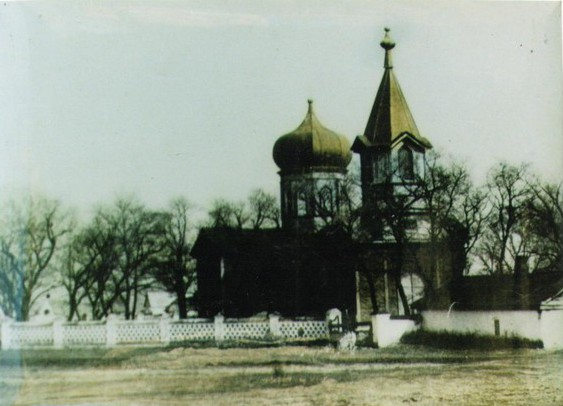 Зруйнована церква у селі Святогорівка 1900 р. фото